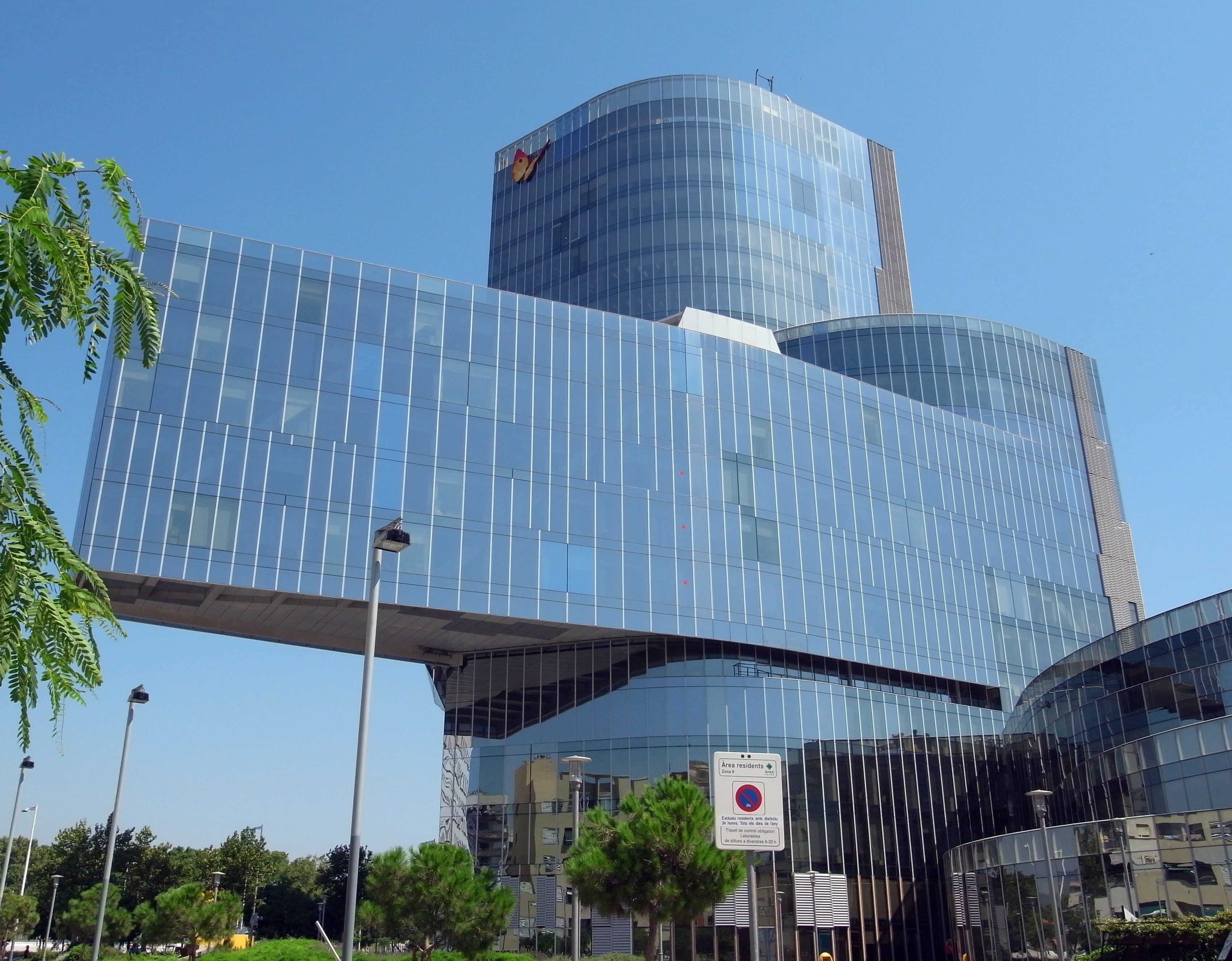 Sede del Grupo Gás Natural (Enric Miralles y Benedetta Tagliabue), La Barceloneta, Barcelona